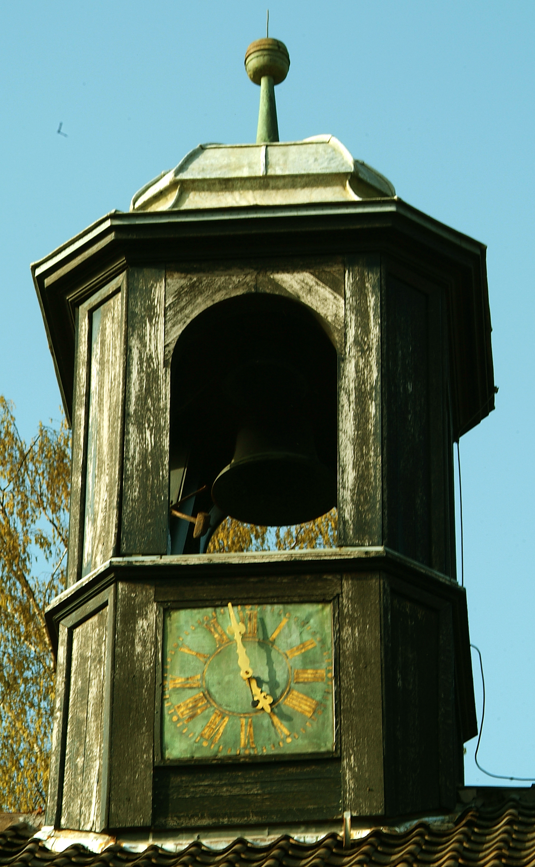 Uhrturm mit Glockenhammer auf dem Pagenhaus ...